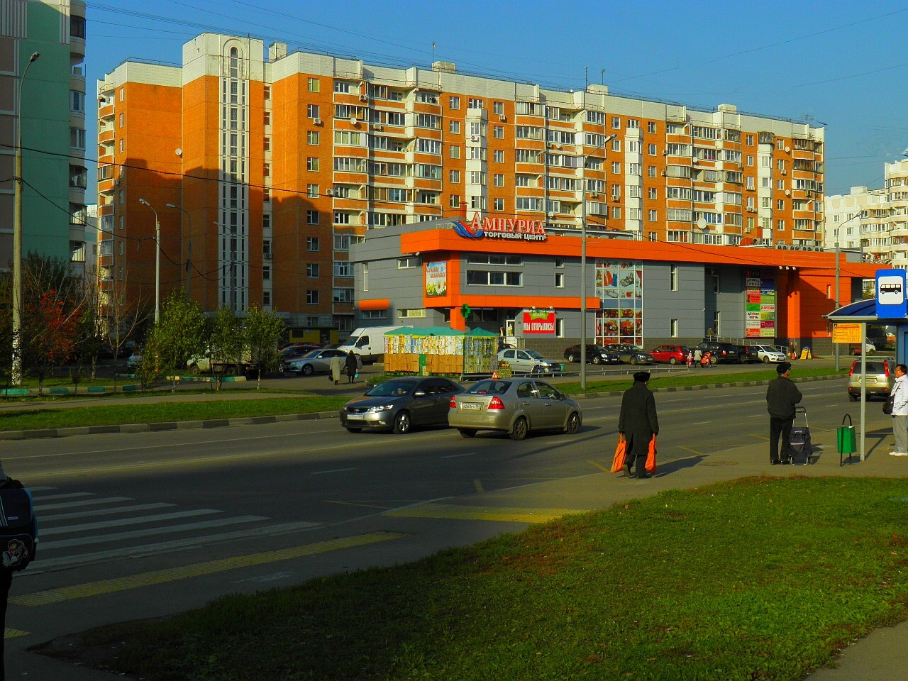 оранжевыйАНСАМБЛЬ